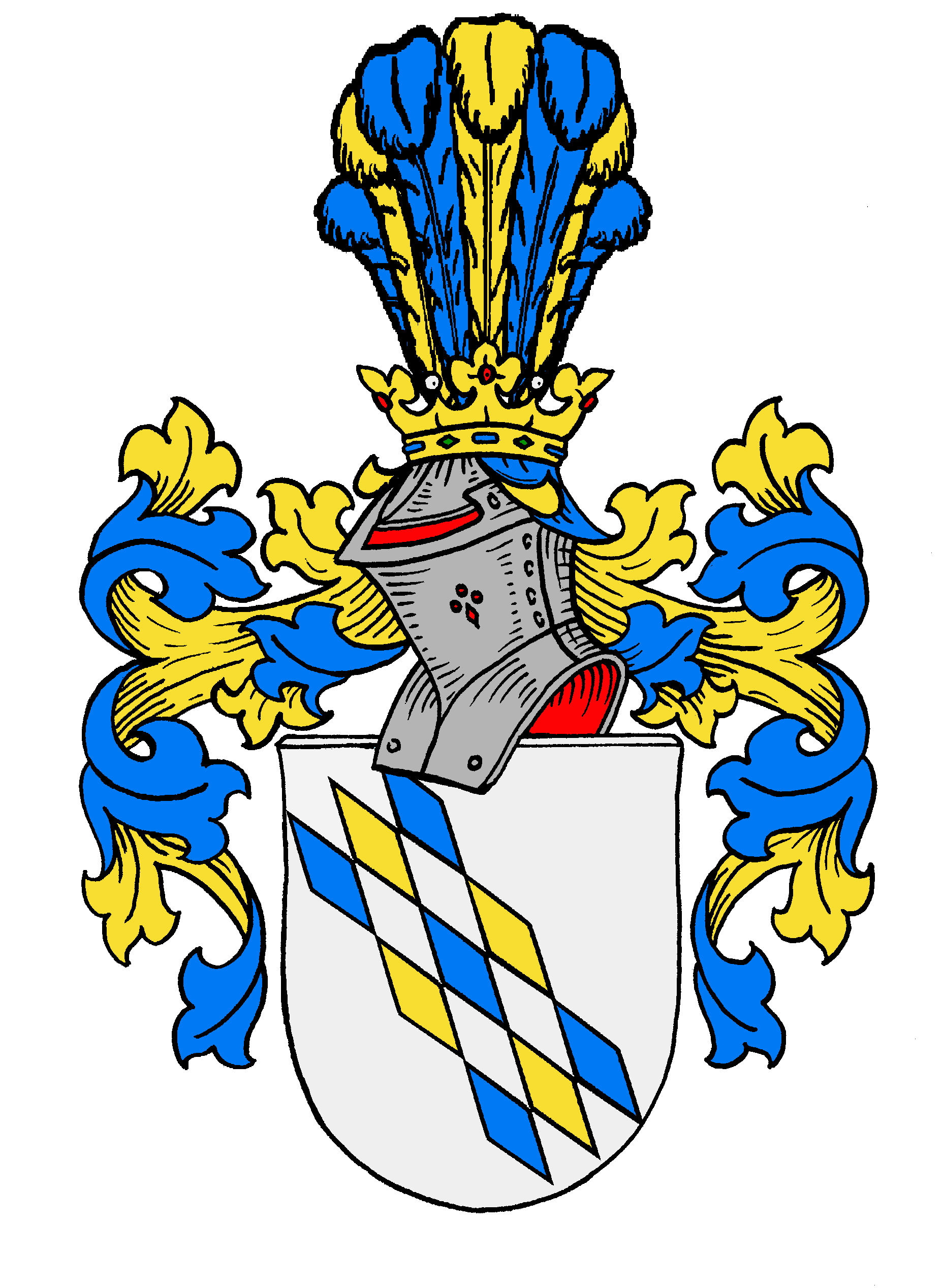 Stammwappen der von Buddenbrock, eines baltischen Adelsgeschlechts, wie es später mit der blauen Farbe und Straußenfedern geführt wurde: „Das Stammwappen zeigt ursprünglich in Silber drei Reihen je drei schrägrechts gestellte, abwechselnd schwarze und goldene Rauten (Wecken) - später drei Reihen je drei schrägrechts gestellte abwechselnd blaue und goldene Wecken. Auf dem gekrönten Helm mit ursprünglich schwarz-goldenen, (später blau-goldenen) Decken zunächst ein Busch von sieben natürlichen Pfauenfedern, später sieben abwechselnd blaue und goldene Straußenfedern.“